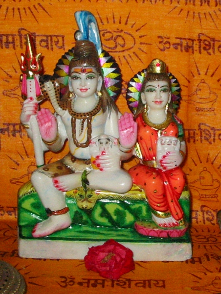 Shiva und seine Gemahlin Parvati und ihre beiden Söhne - Statue aus Marmor, bemalt